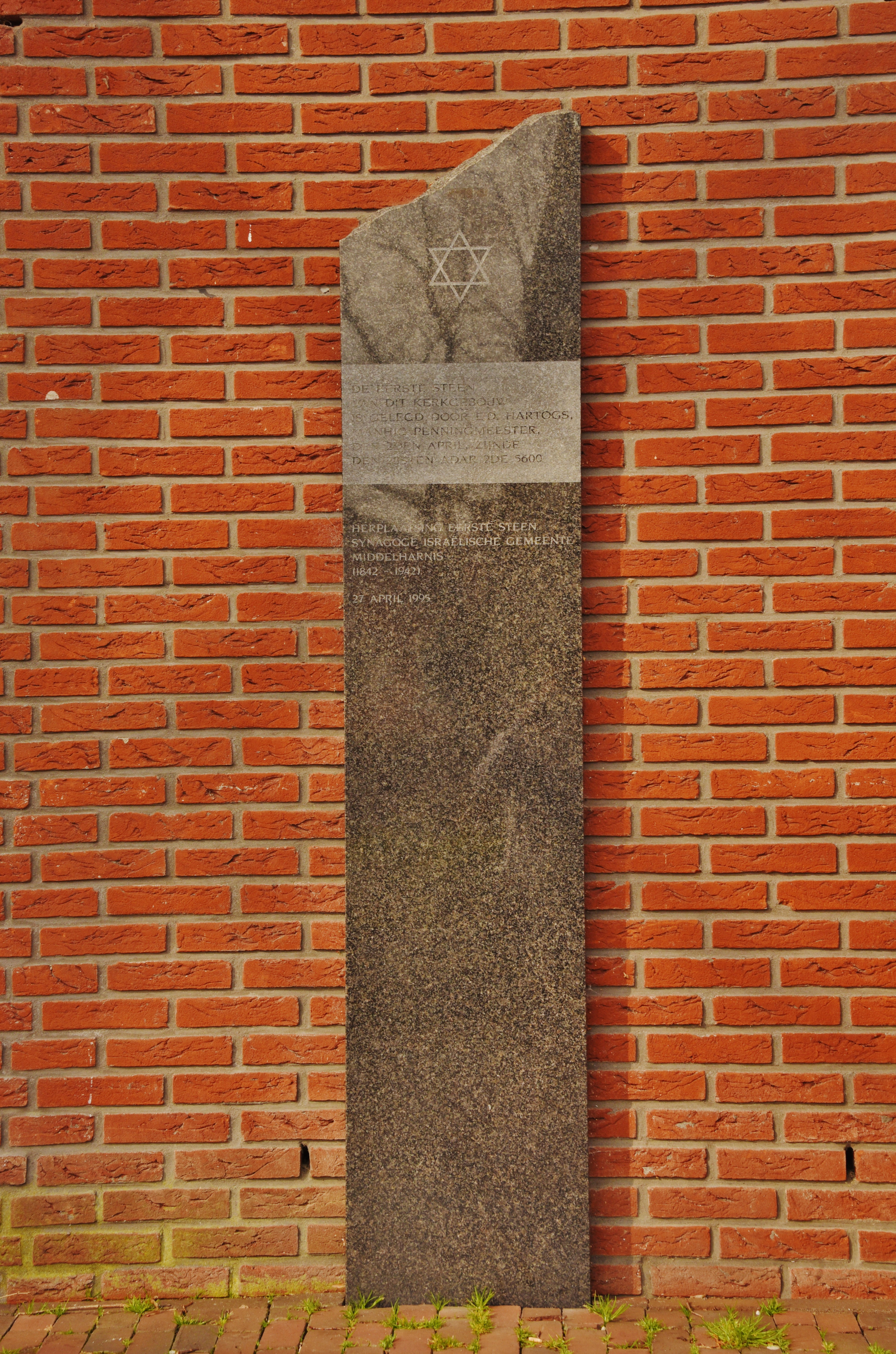 Denkmal für Synagoge in Middelharnis